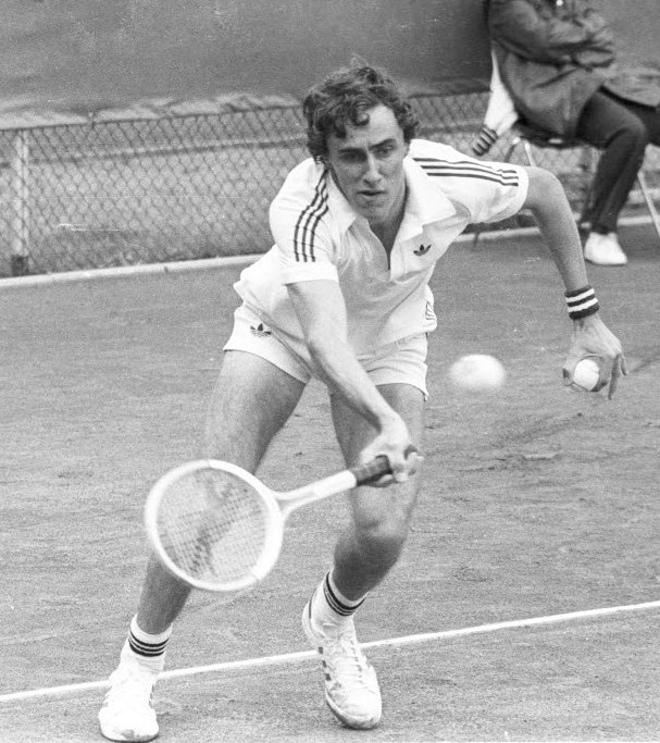 auf der Anlage des 1. Kieler Hockey- und Tennis-Clubs am Kopperpahler Teich 27. Im Bild der franz. Tennisspieler Christoph Vasselin.